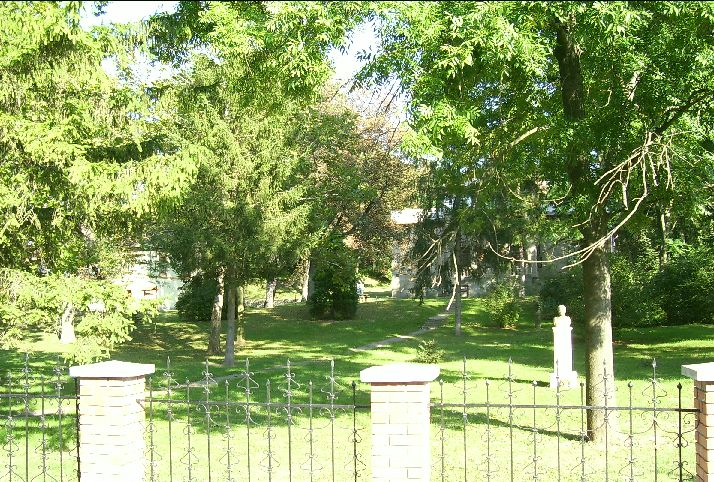 A horpácsi kastélypark 2006-ban, a fák mögött balra a Szontágh-kúria, jobbra pedig a Mikszáth-kúria látható a háttérben, Nógrád megye